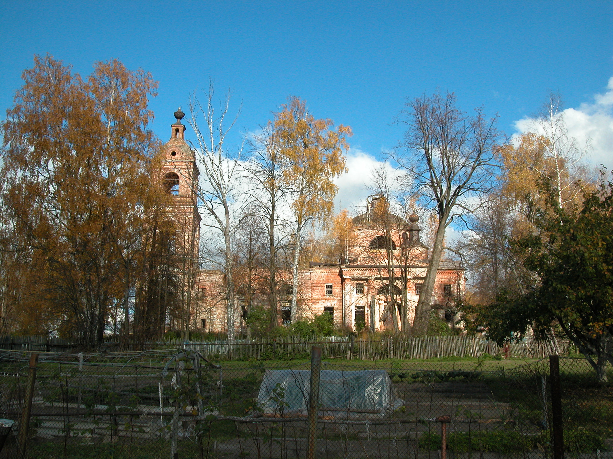 Храм Спаса Всемилостивейшего в селе Спасс